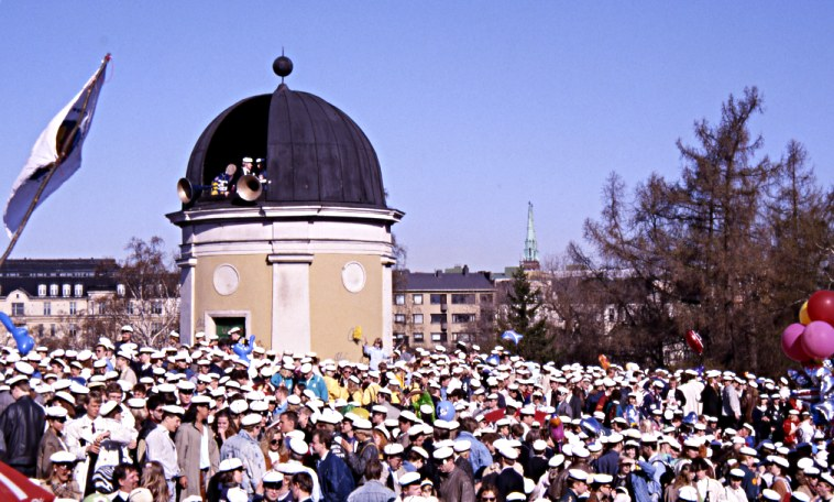 Helsingin Ullanlinnanmäki Vappuna 1989.